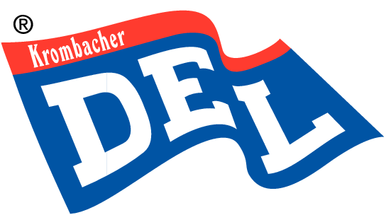 Logo der Deutschen Eishockey-Liga (1995-1996)